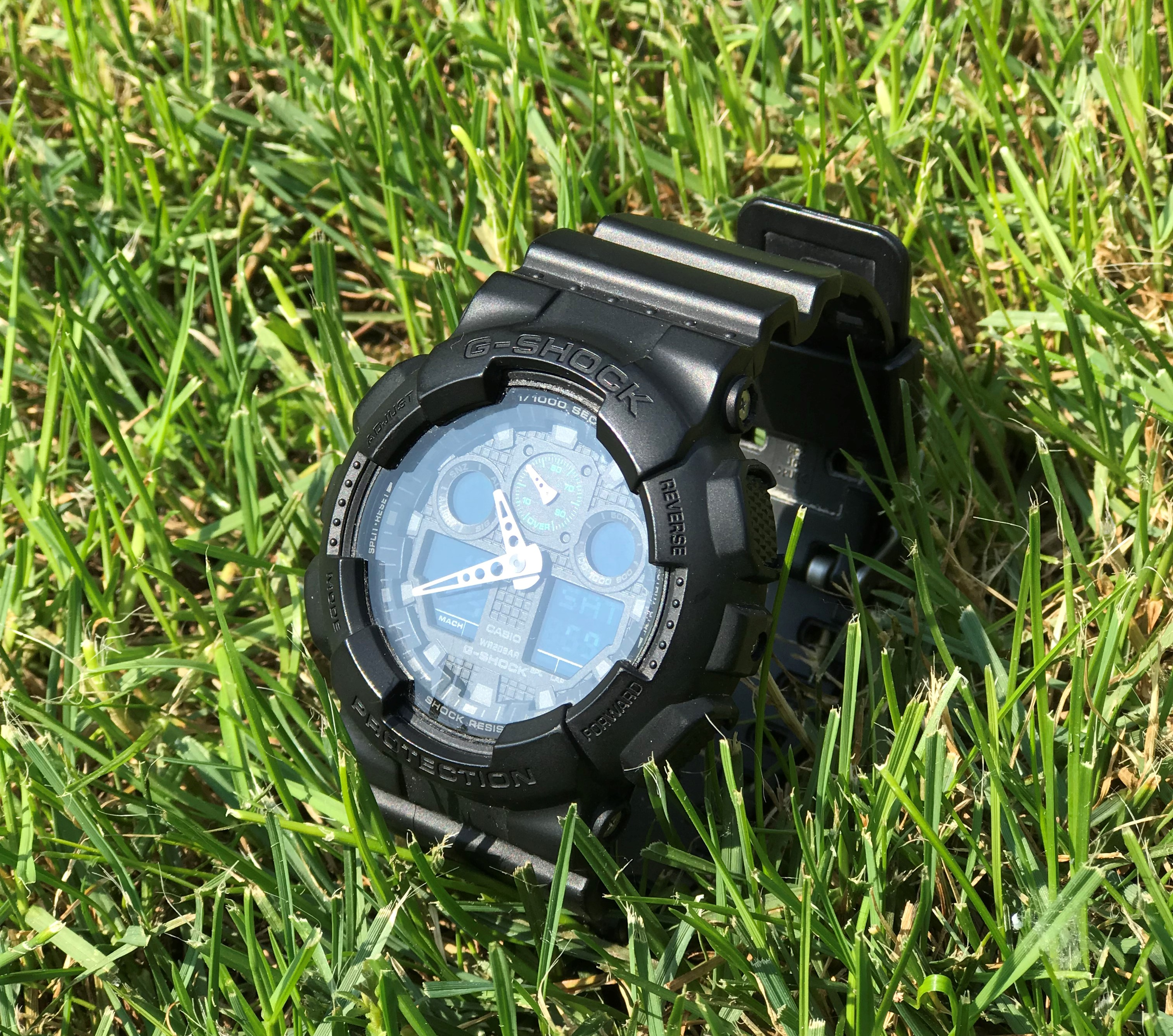 Касио модел произведен 2010. године и један од најпродаванијих модела икада.